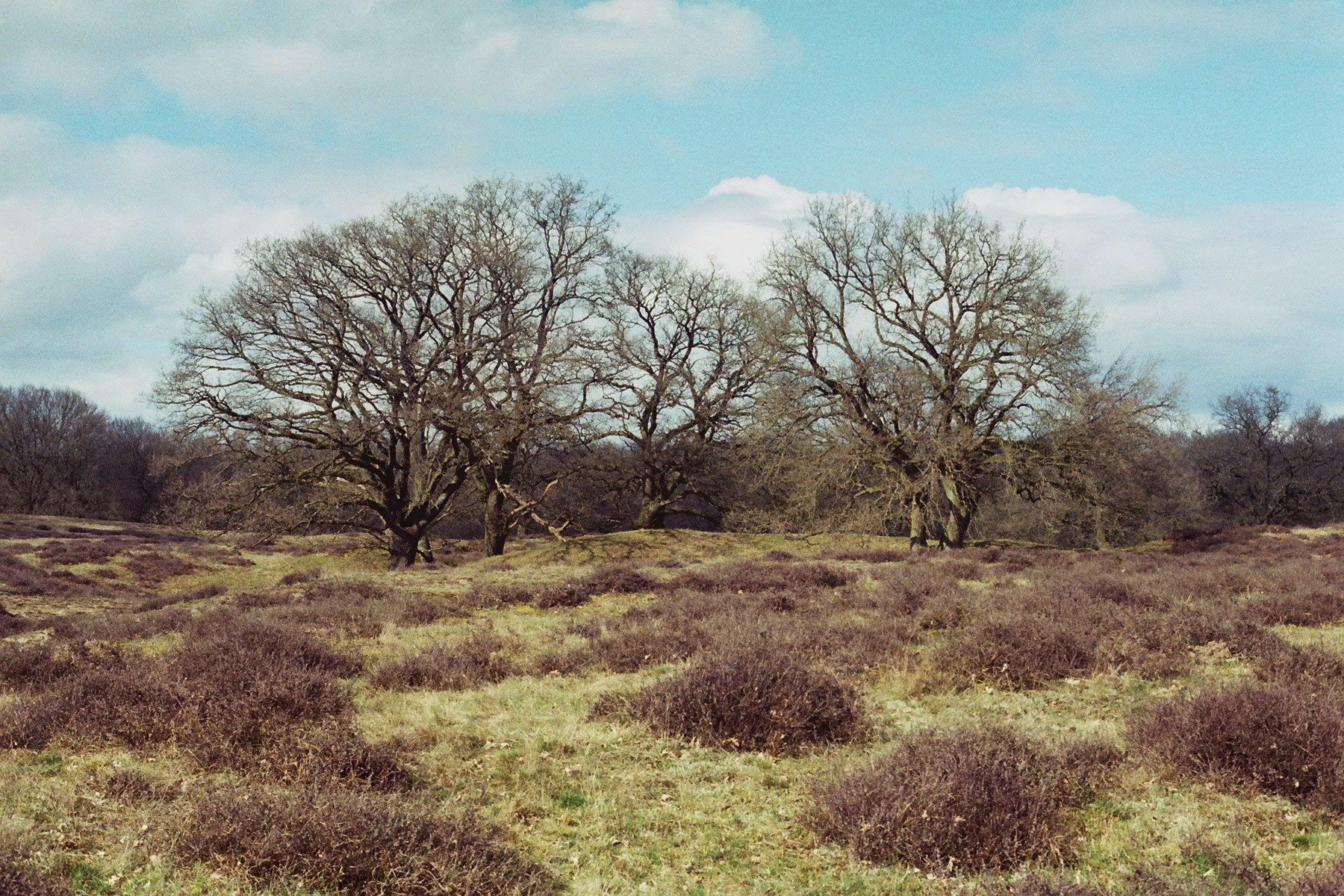 Emsland Meppen-Borken - NSG Hutewald "Borkener Paradies"